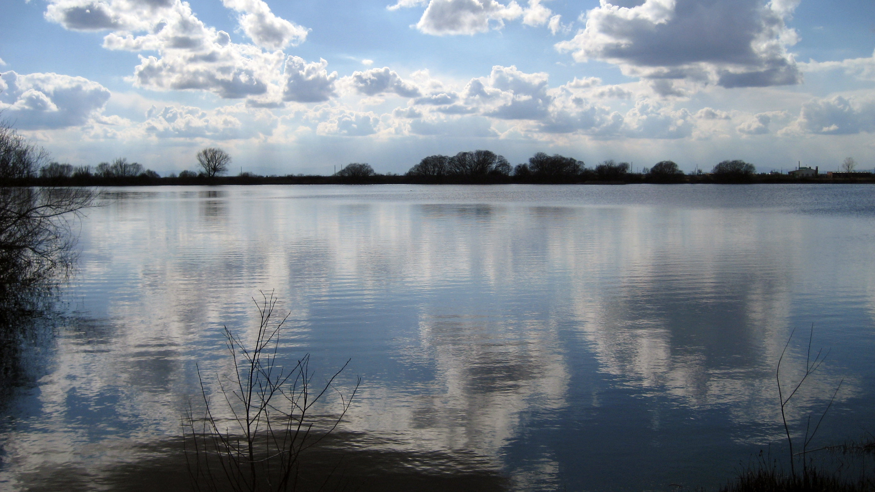 Panorámica de la laguna de Chozas de Arriba (León)